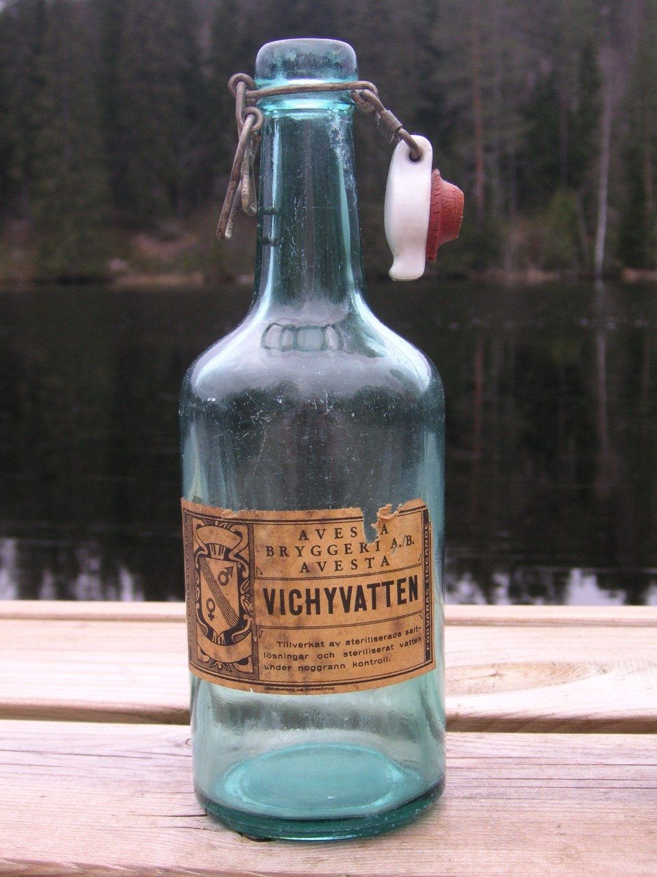 Svensk vichyvattenflaska med patentkork från 1800-talets slut.